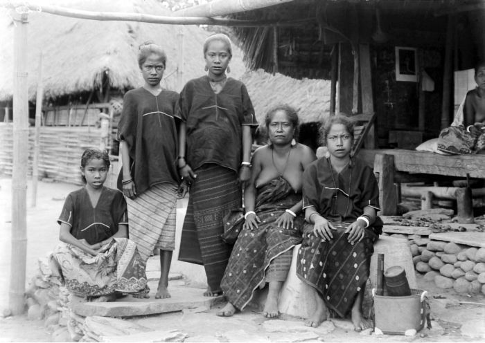 Negatief. Vrouw en dochters van Raga Noli, de Radja van een dorp in Nage, een onderafdeling van Ngada, Midden-Flores